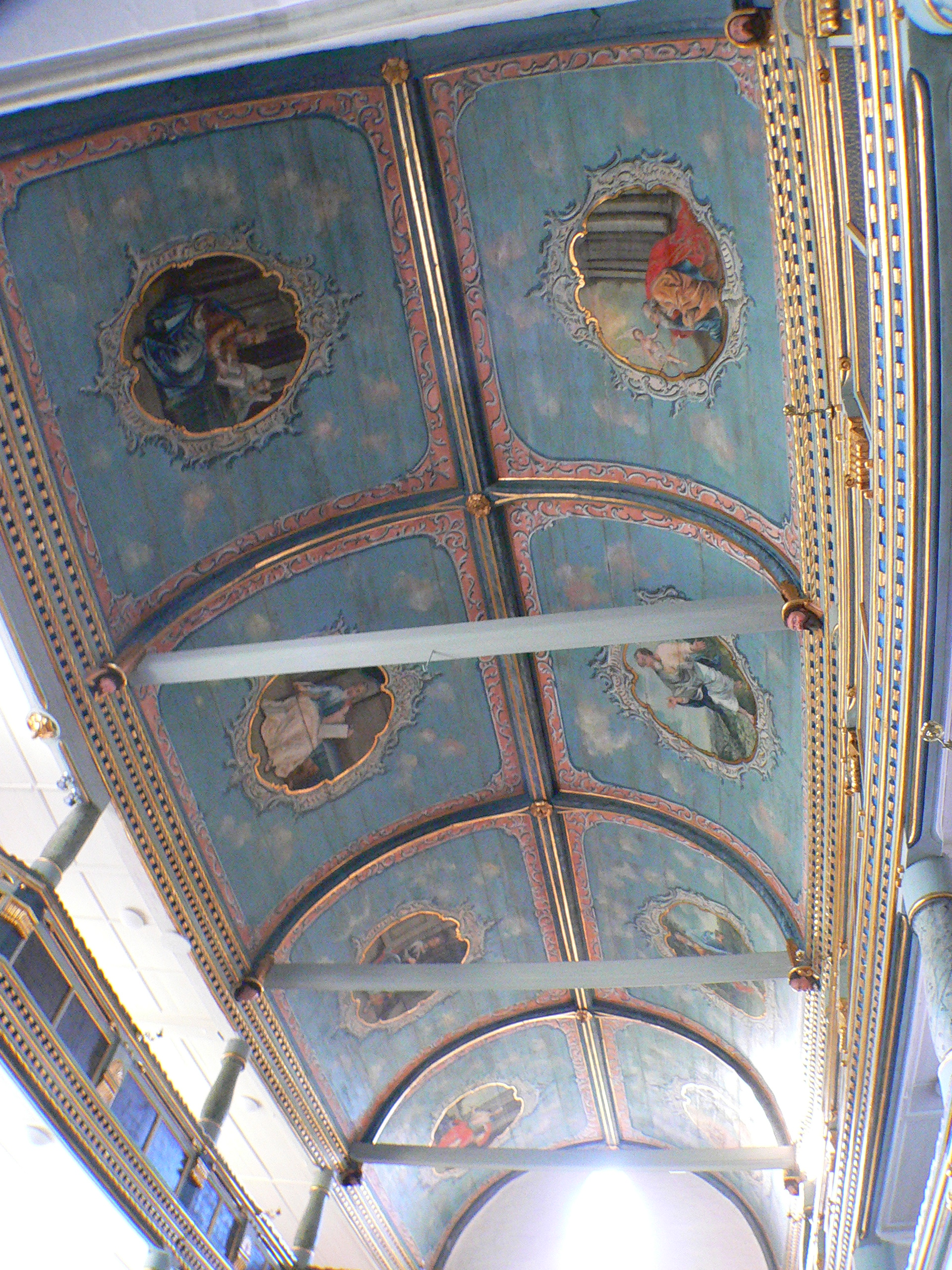 Kirche St. Johann in Herpf (Thüringen), Tonnendecke